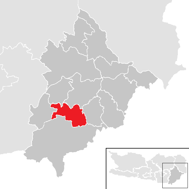 Bezirk Völkermarkt